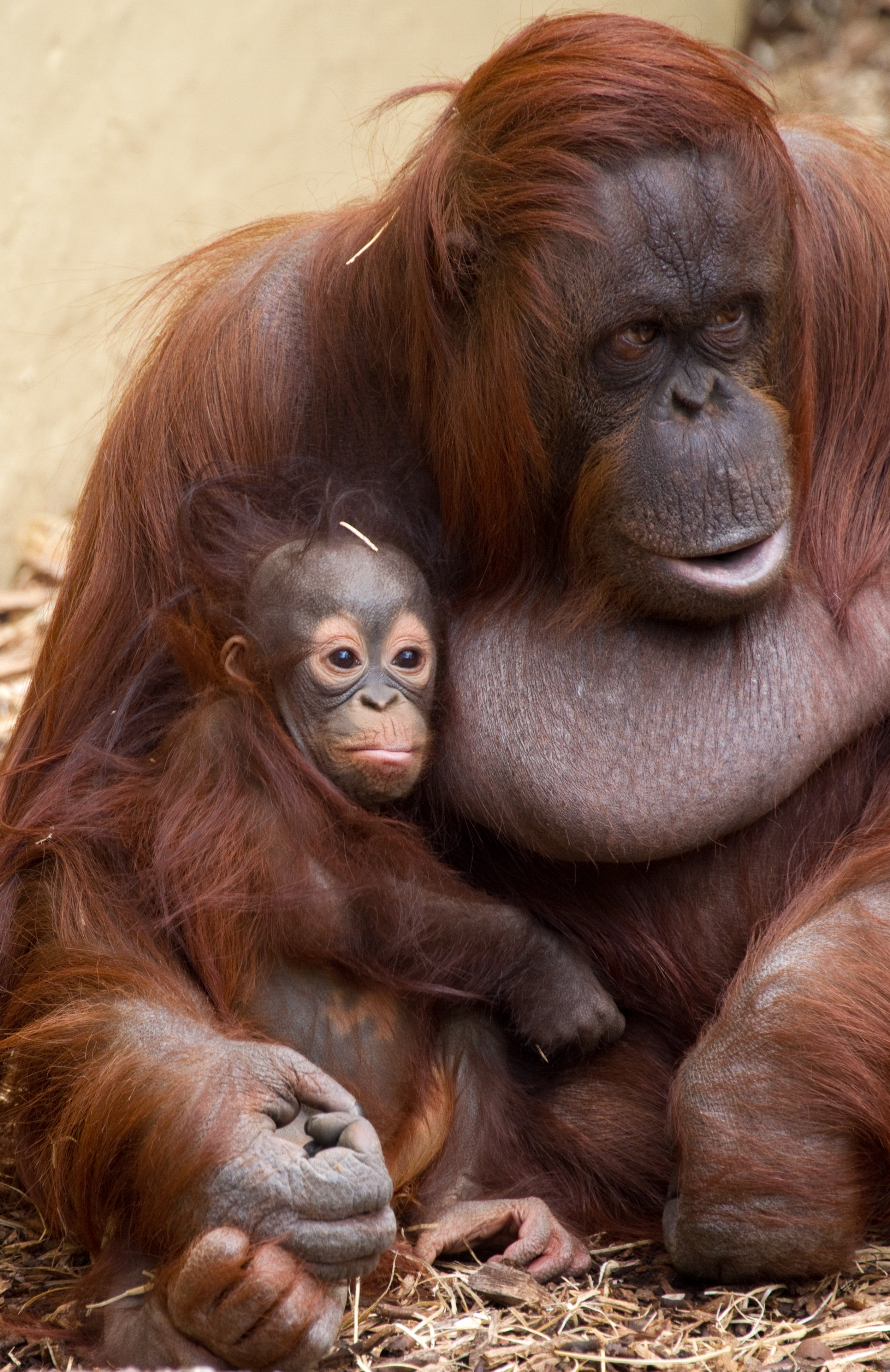 Baby Orangutan 3